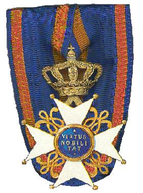 Eigen tekening van een ordelint. Het kruis bevind zich in mijn verzameling